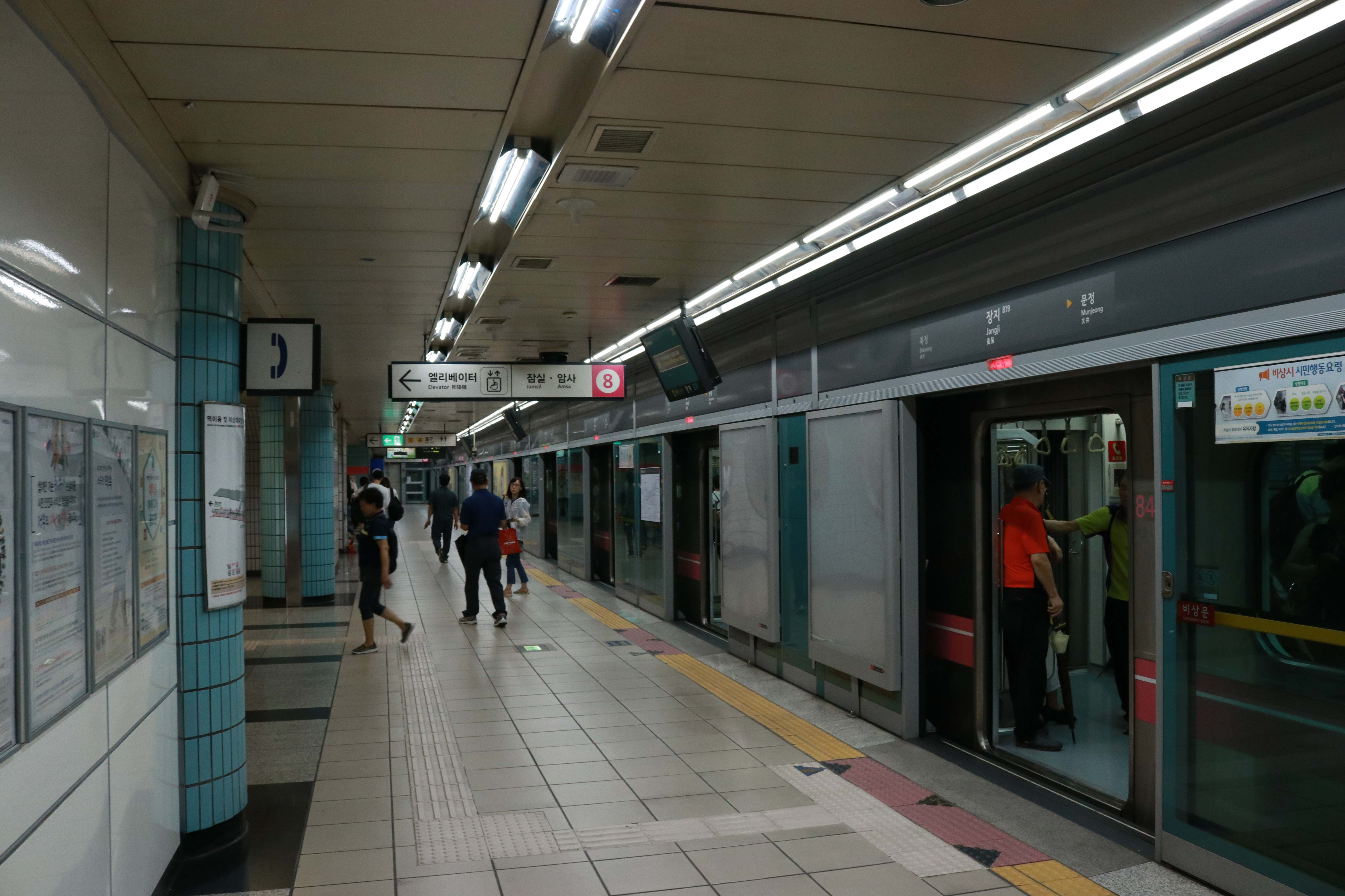 장지역 승강장